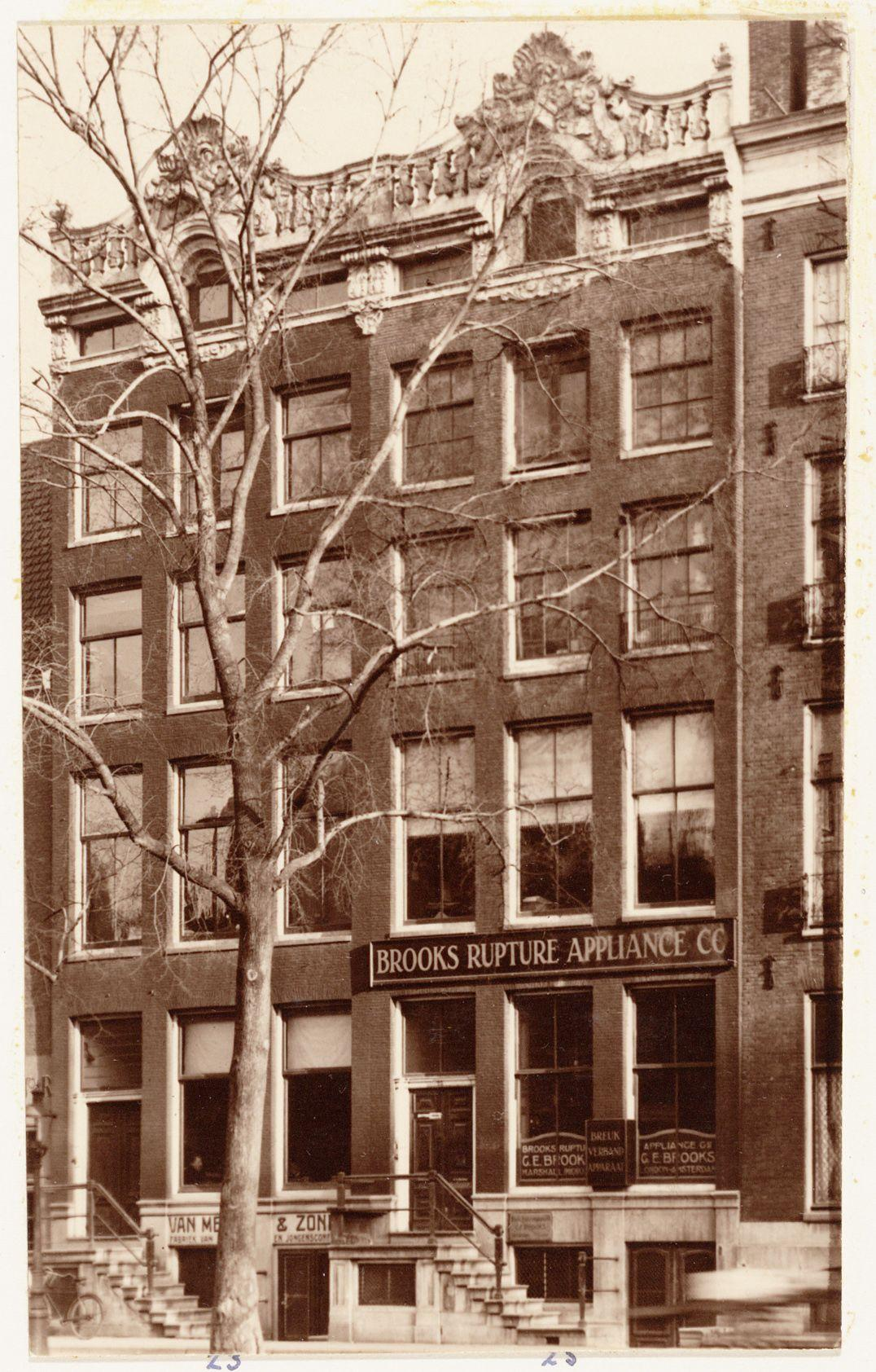 Beschrijving Singel 23-27 (ged.) (v.l.n.r.). Op nummer 25 Brooks Rupture Appliance Compagny Brooks Rupture Appliance Co. Documenttype foto Vervaardiger Onbekend Anoniem Collectie Archief van het Bureau Monumentenzorg: glasnegatieven en negatiefloze foto's Datering 1920 ca. Geografische naam Singel Inventarissen Afbeeldingsbestand 012000004282